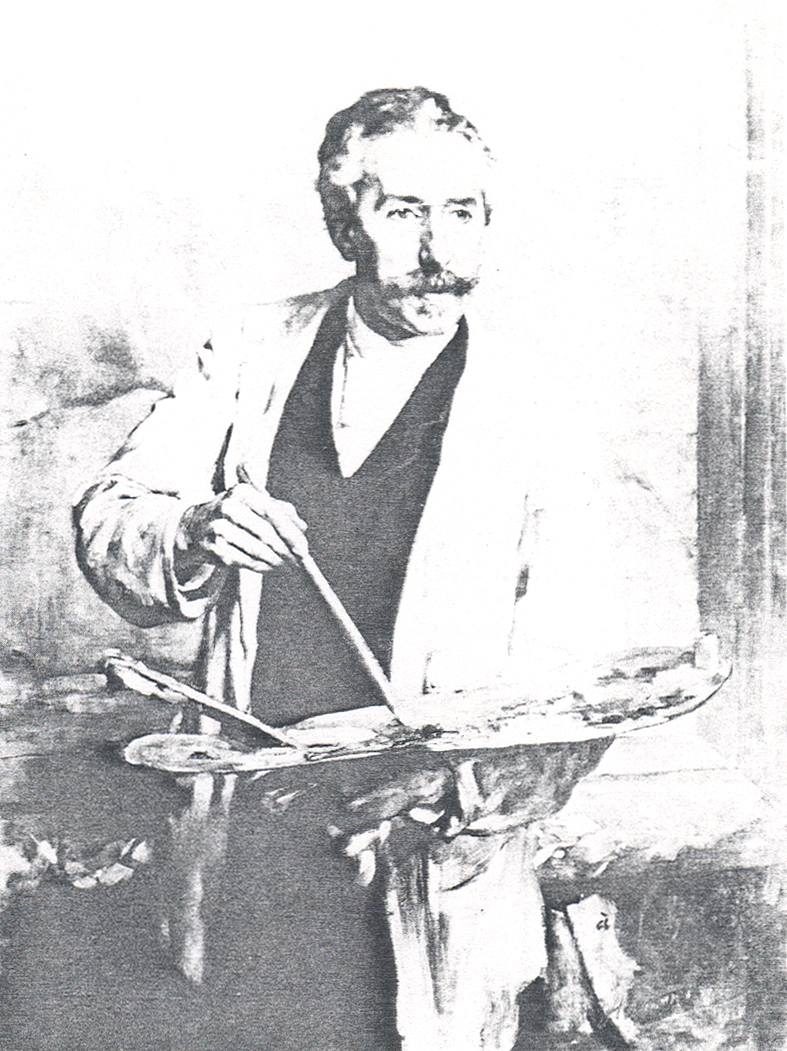 Herman Richir (1866-1942) Portrait du peintre Charles Hermans (1839-1924) Huile sur toile Collection privée